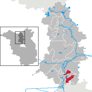 Hohen Neuendorf in Brandenburg (Country) - District Oberhavel